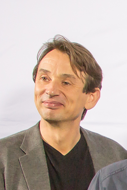 Ralf Husmann bei der WDR-Filmpremiere "Vorsicht vor Leuten" am 17. Februar 2015 in Köln